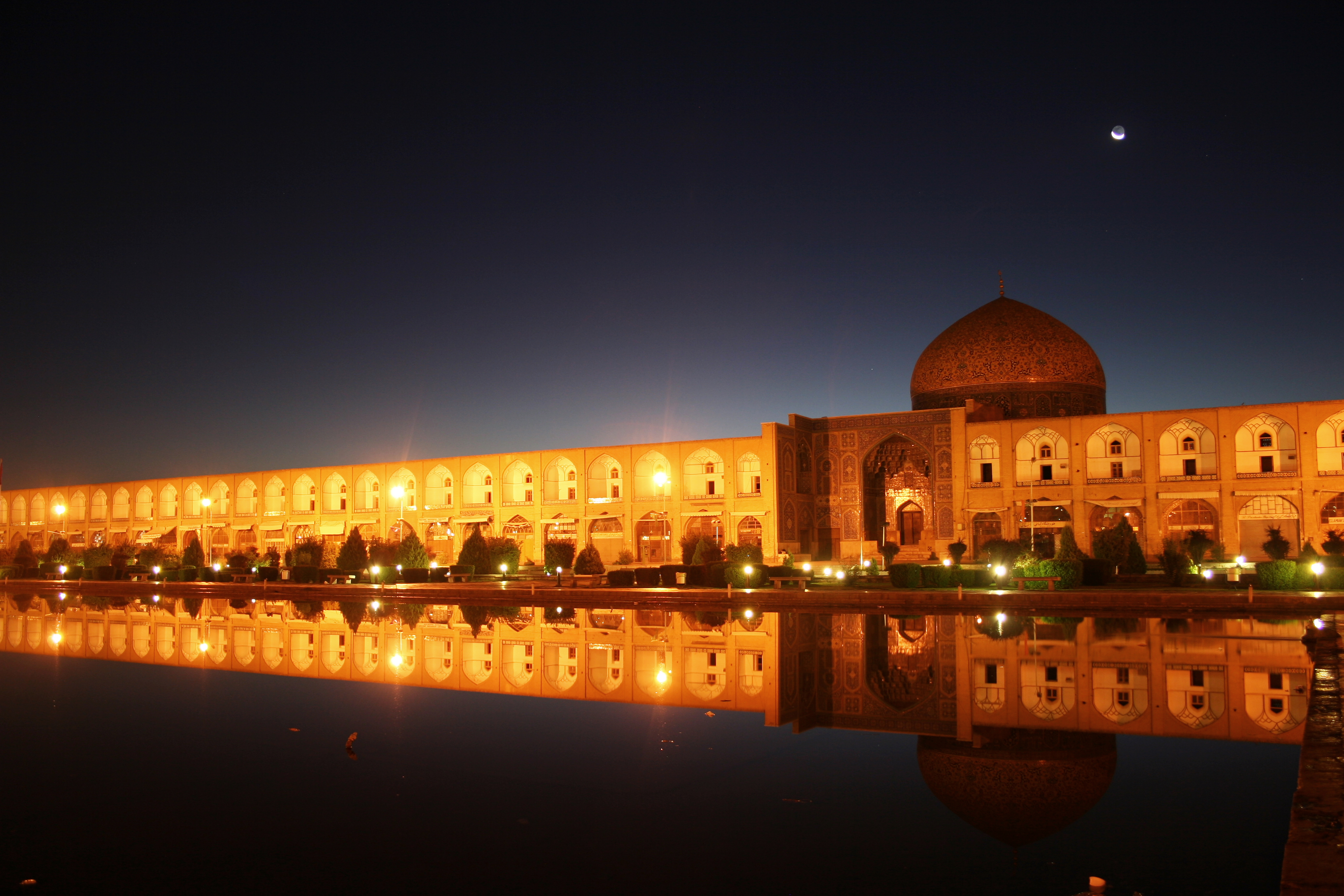 میدان نقش جهان لحظاتی بعد از غروب آفتاب.